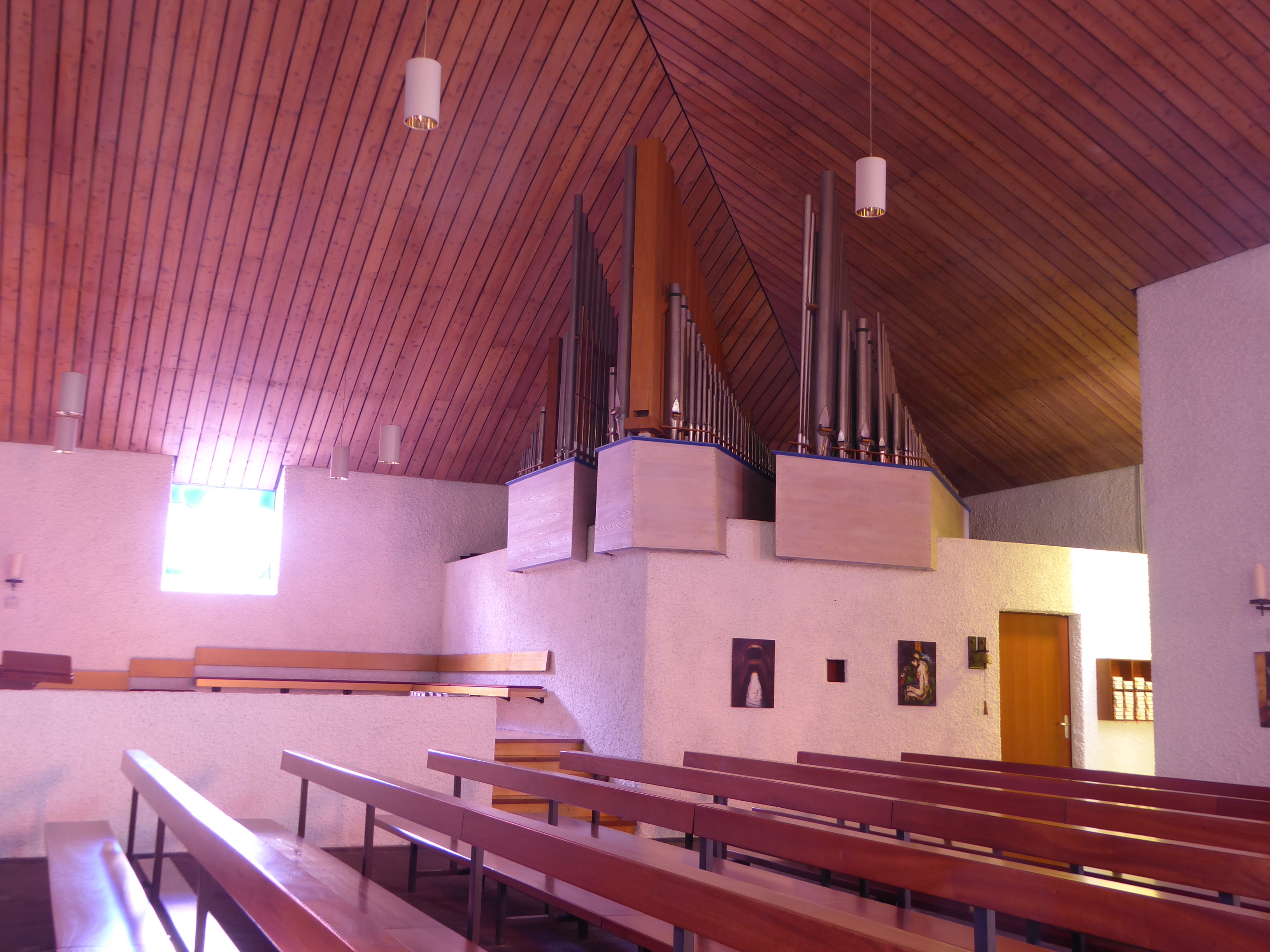 Pfarrkirche Schellenberg FL: Orgel